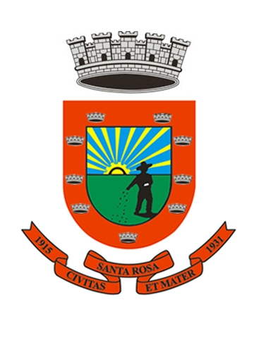 Brasão de Santa Rosa - RS